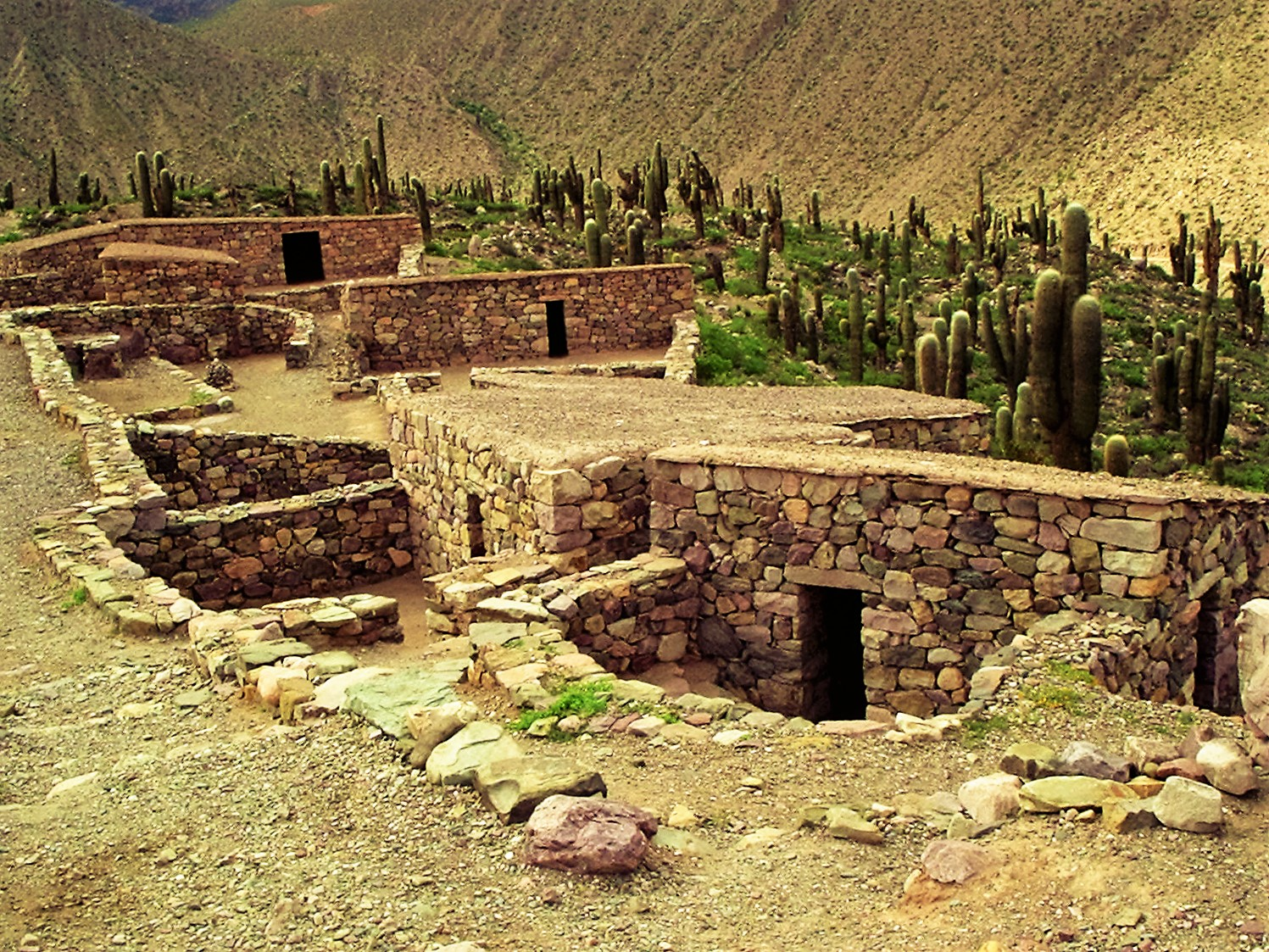 Versión modificada de Pucará de Tilcara 02.jpg; he modificado solamente color e iluminación.